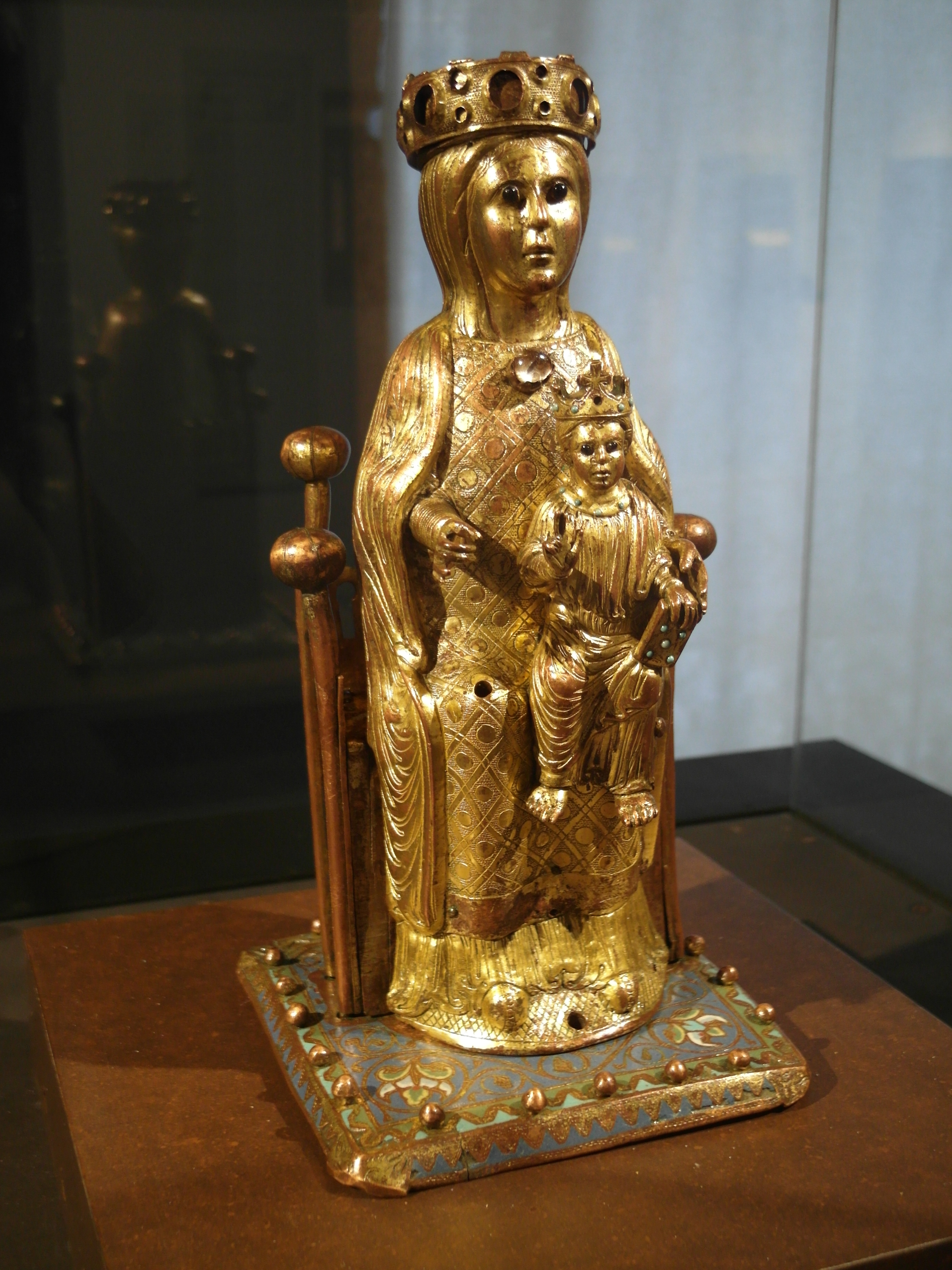 Virgen de las Batallas, taller de Limoges, hacia 1225-1235, del monasterios de San Pedro de Arlanza. Museo de Burgos.